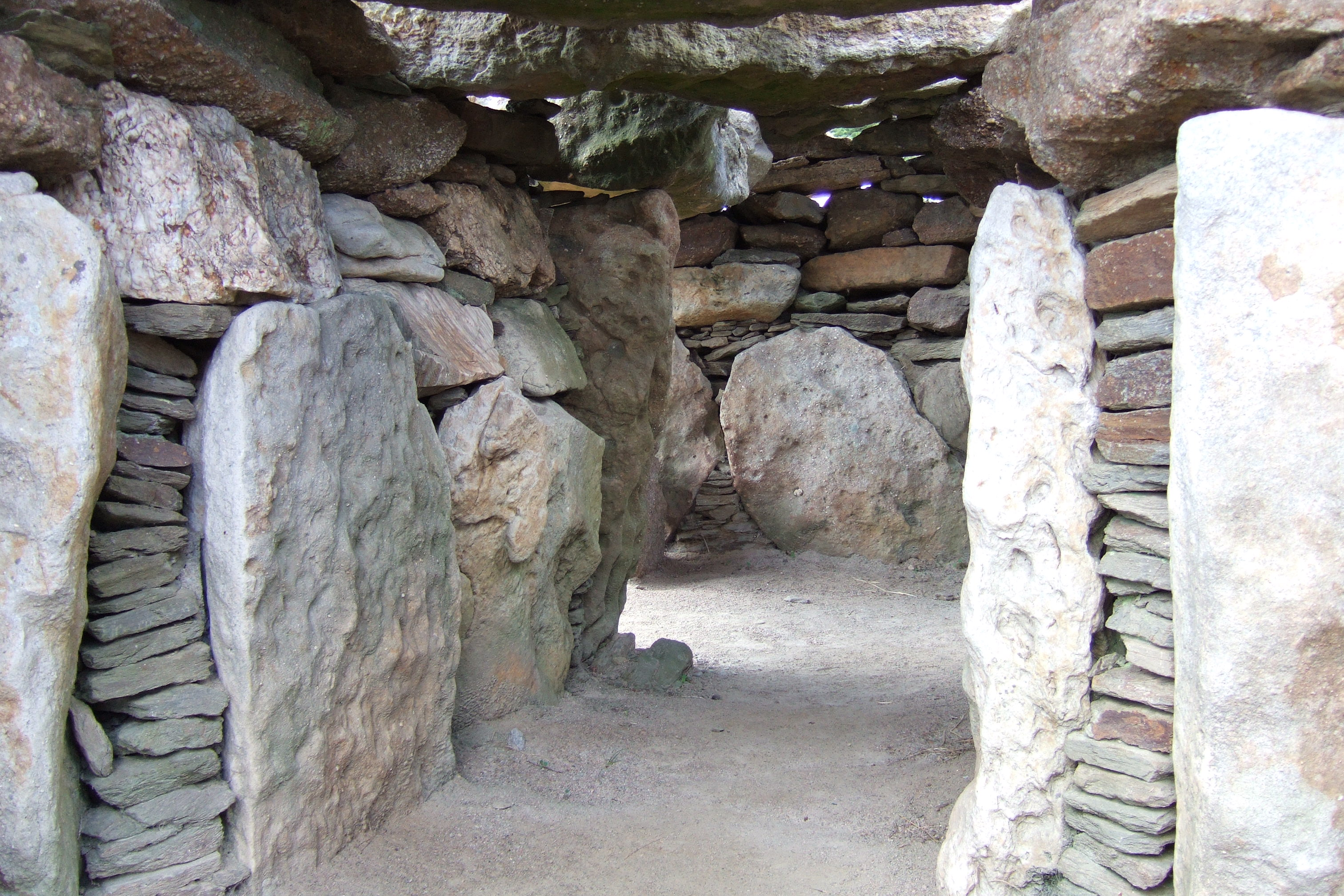 Le mégalithe de la Joselière